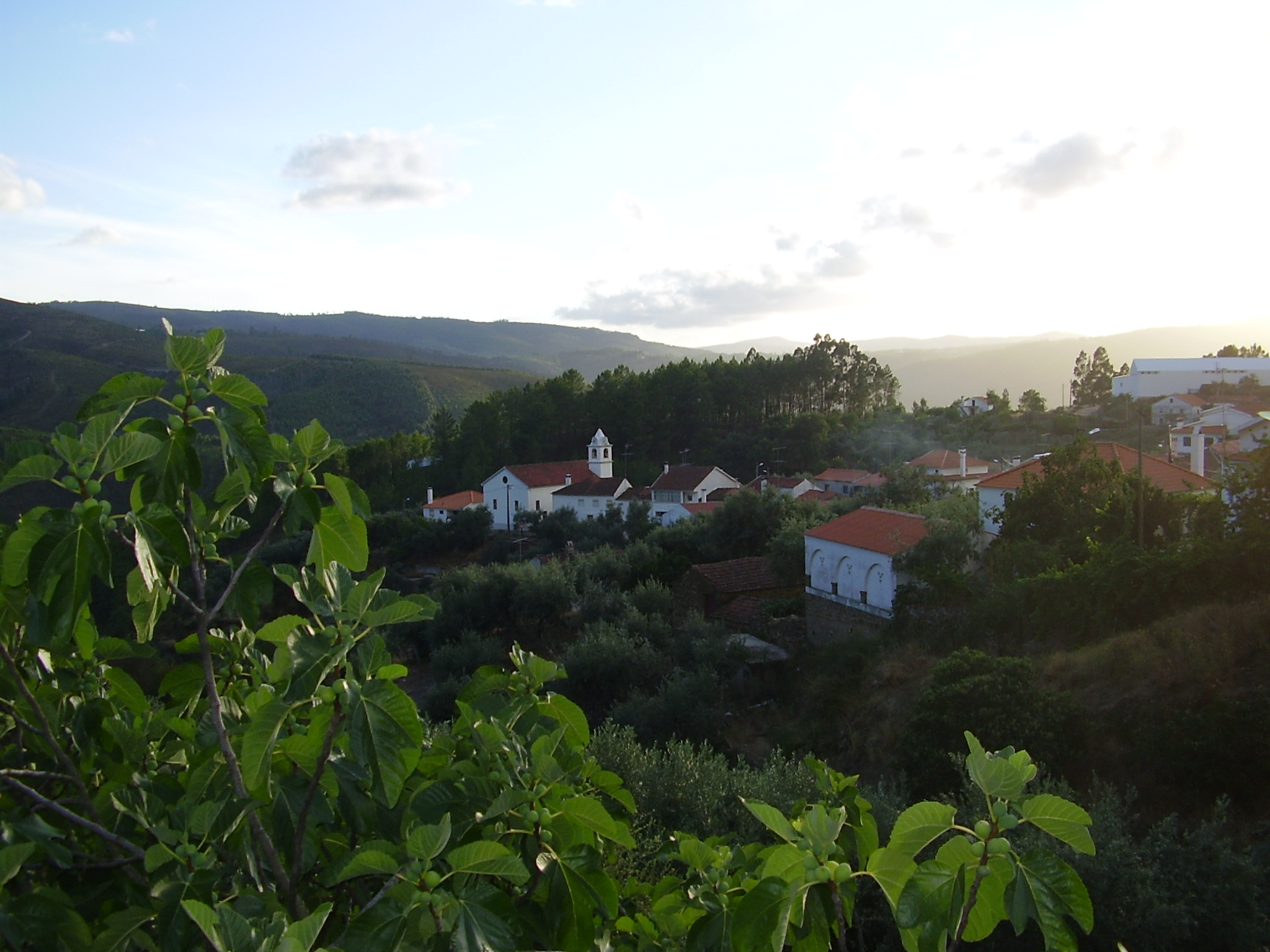 Vista parcial da aldeia de Vilar Barroco.